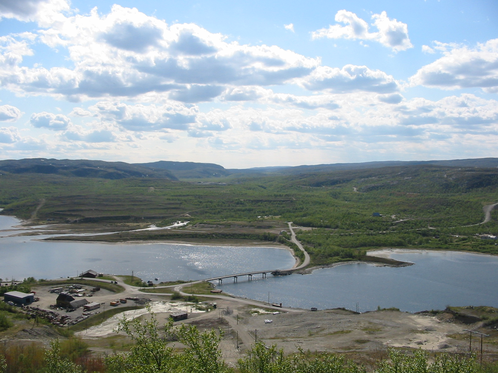 Sandnes, Sør-Varanger, Finnmark, Norway